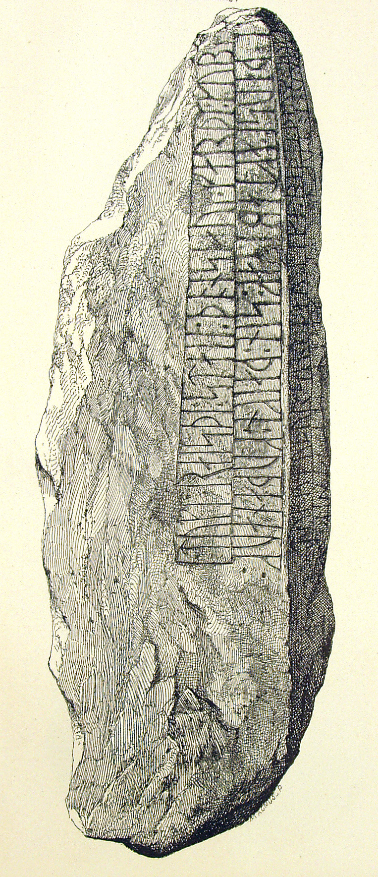 Gunderup-stenen 1 er en runesten, fundet i Gunderup i 1629.